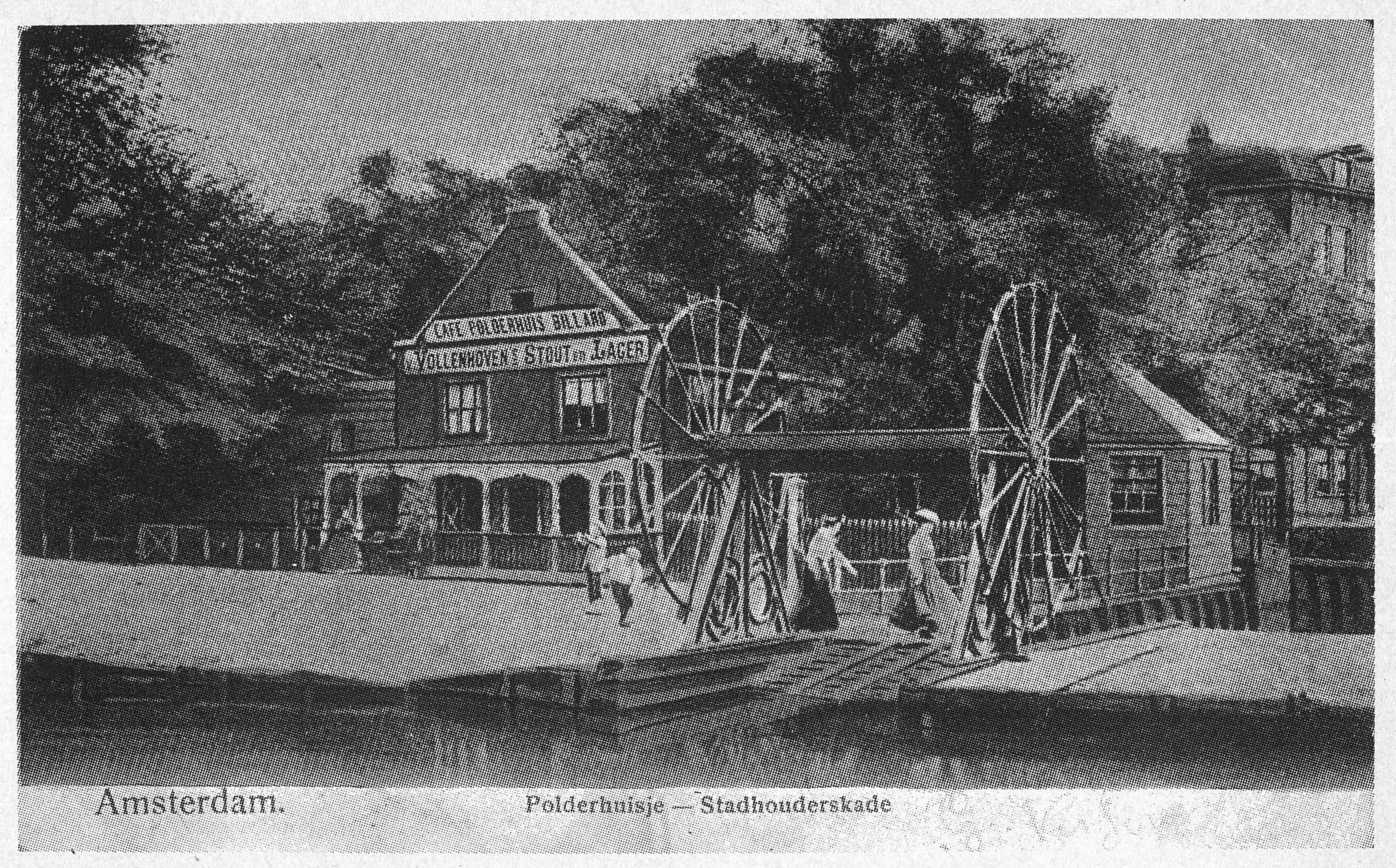 Photographed in Amsterdam between 1900 and 1914.